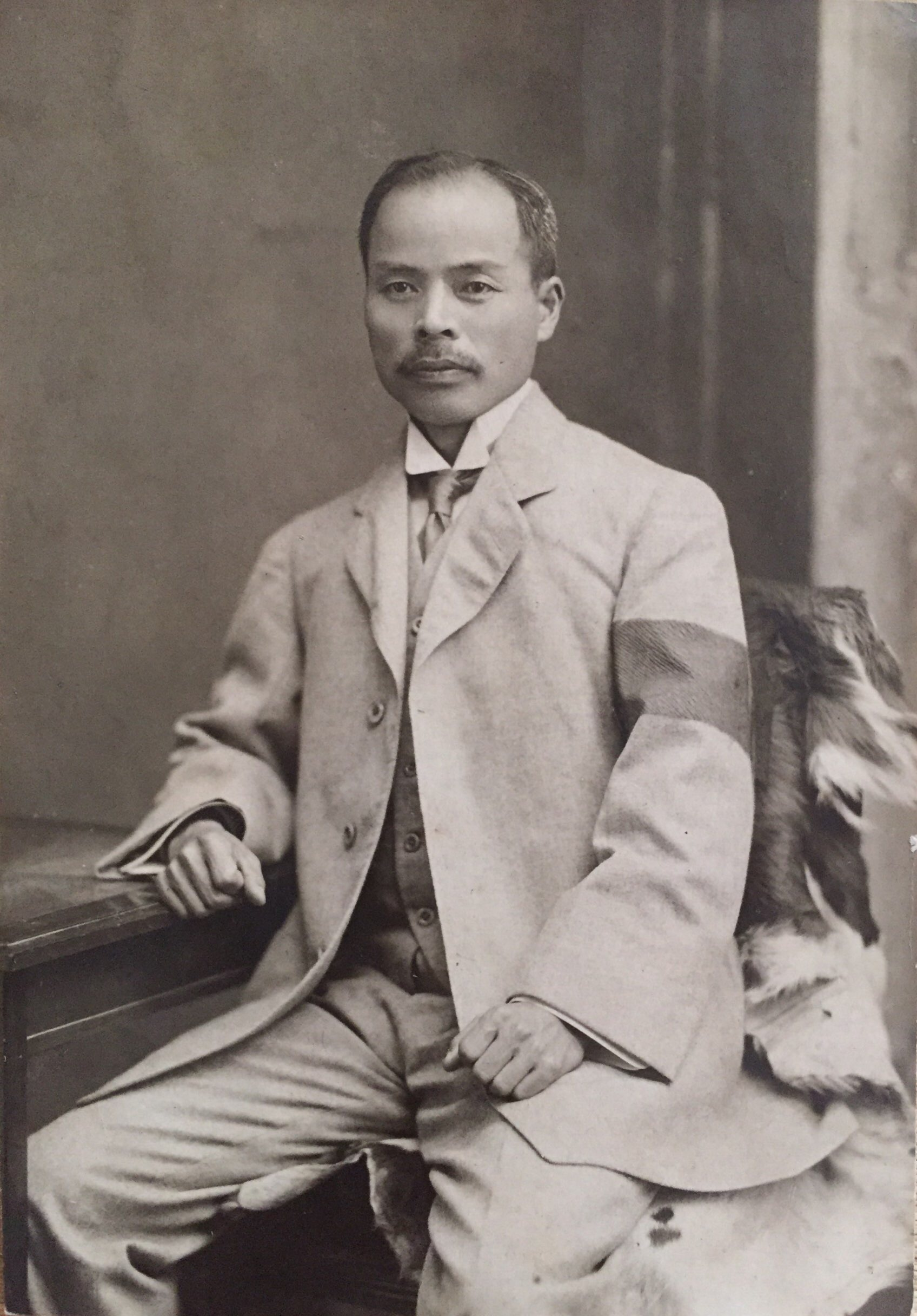 山田三七郎